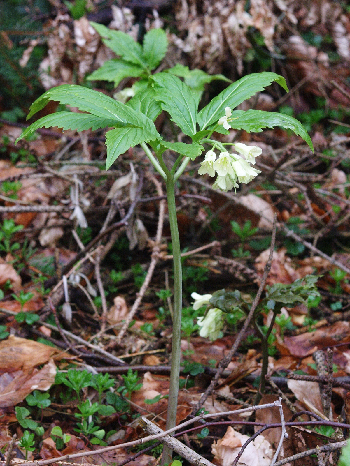 Cardamine enneaphyllos, Schwäbisch-Fränkische Waldberge, Germany